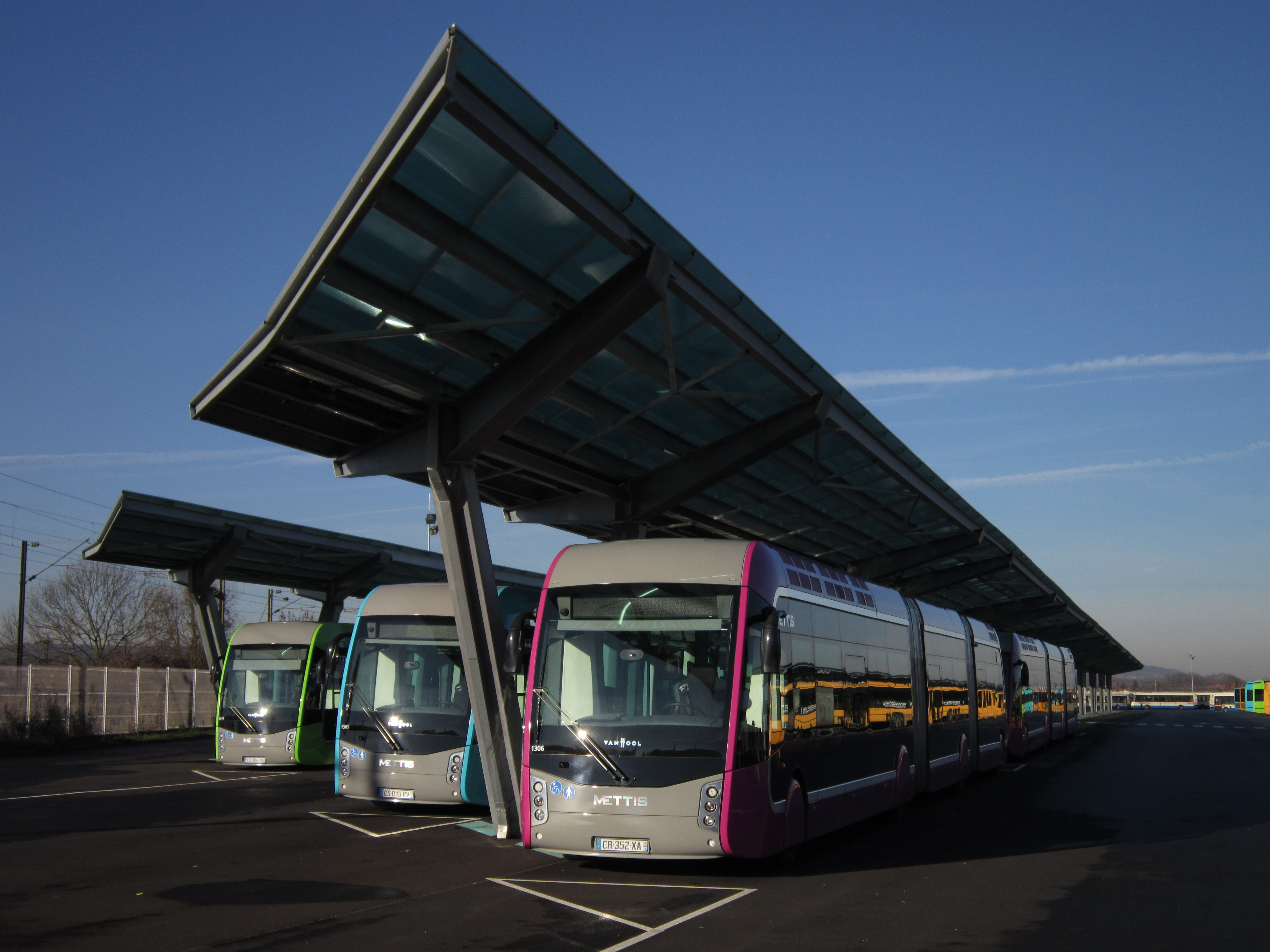 Rangée de bus des lignes Mettis stationnés au dépôt.